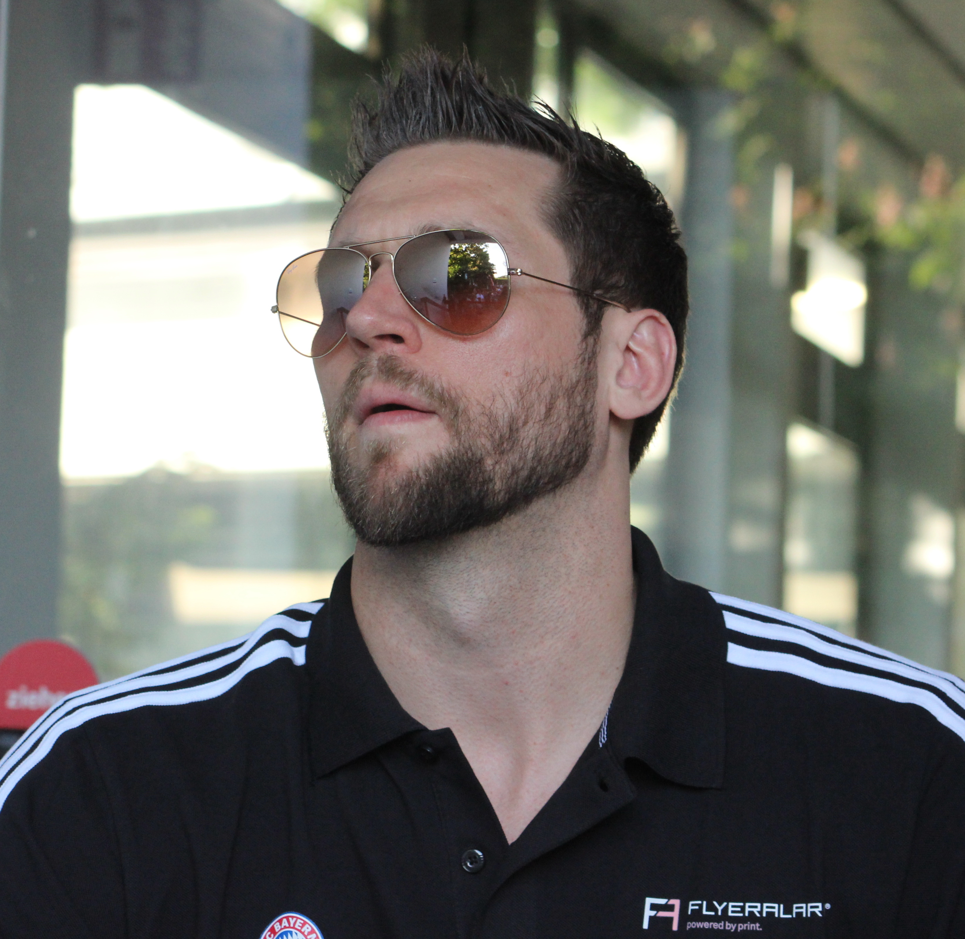 FC Bayern München (Basketball)Jared Homan